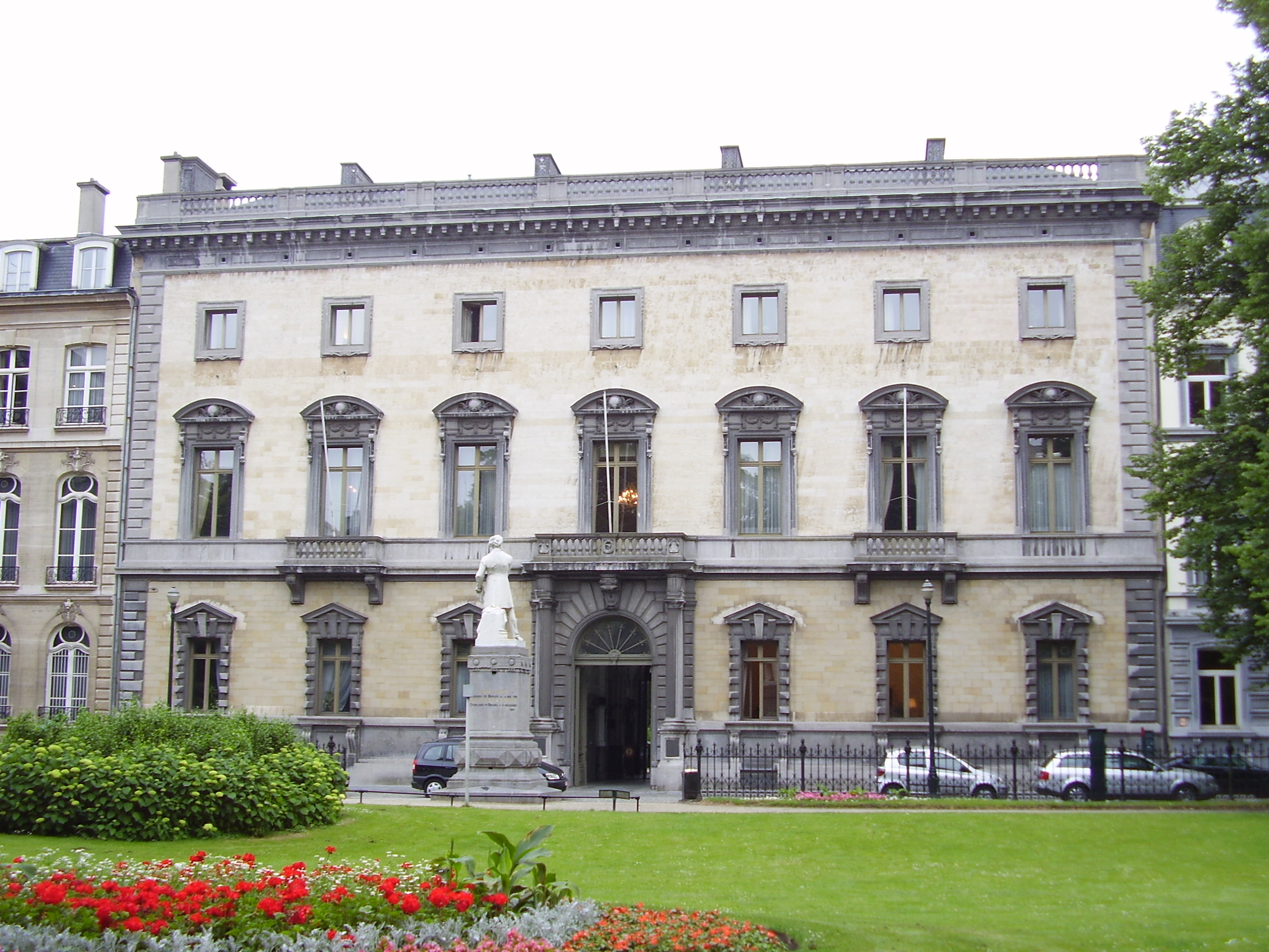 Palais Van Assche (1856- 1858), rue de la Science, Bruxelles - architecte Alphonse Balat – actuellement Conseil d’État